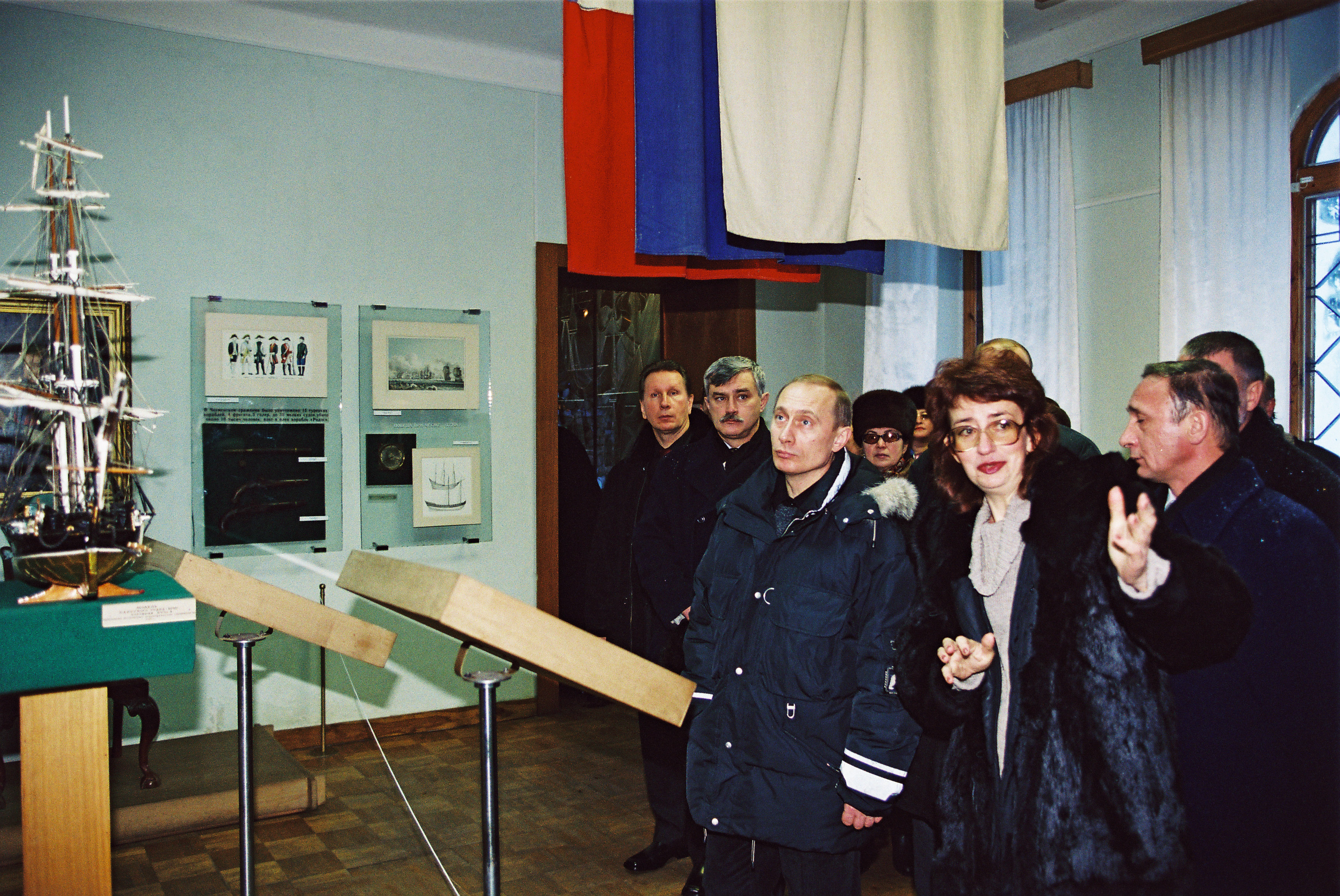 ПЕРЕСЛАВЛЬ-ЗАЛЕССКИЙ, ЯРОСЛАВСКАЯ ОБЛАСТЬ. Во время осмотра экспозиции музея-усадьбы «Ботик Петра Первого».